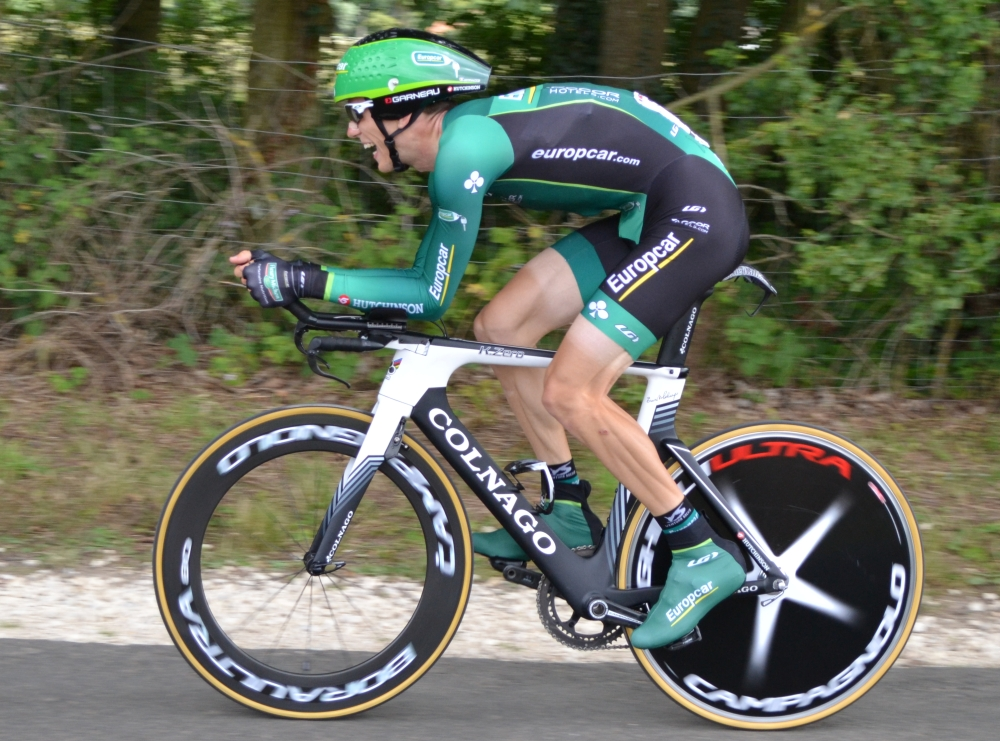 Pierre Rolland TDF2012